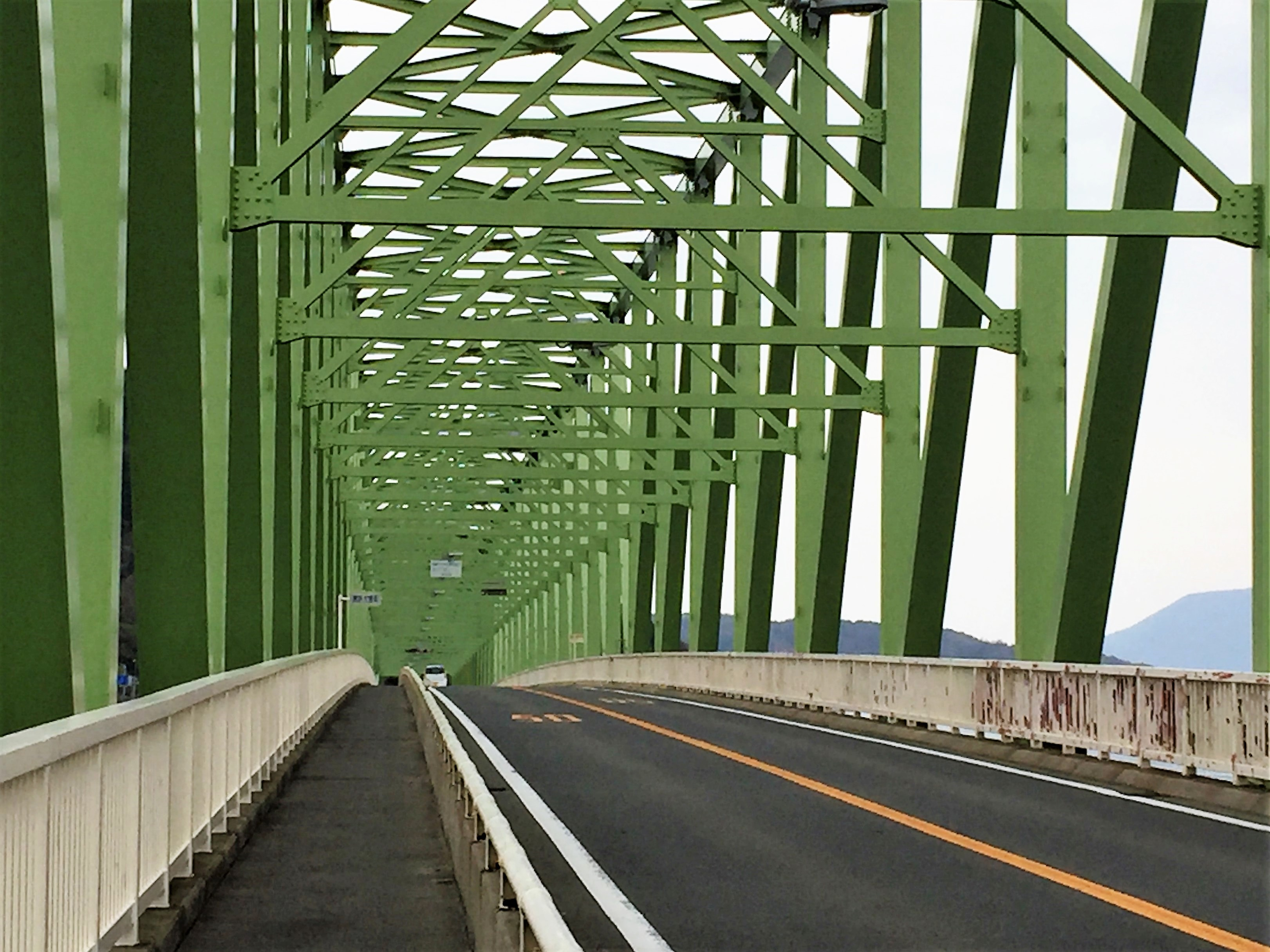 大島大橋（山口県）。周防大島にかかる鉄橋。